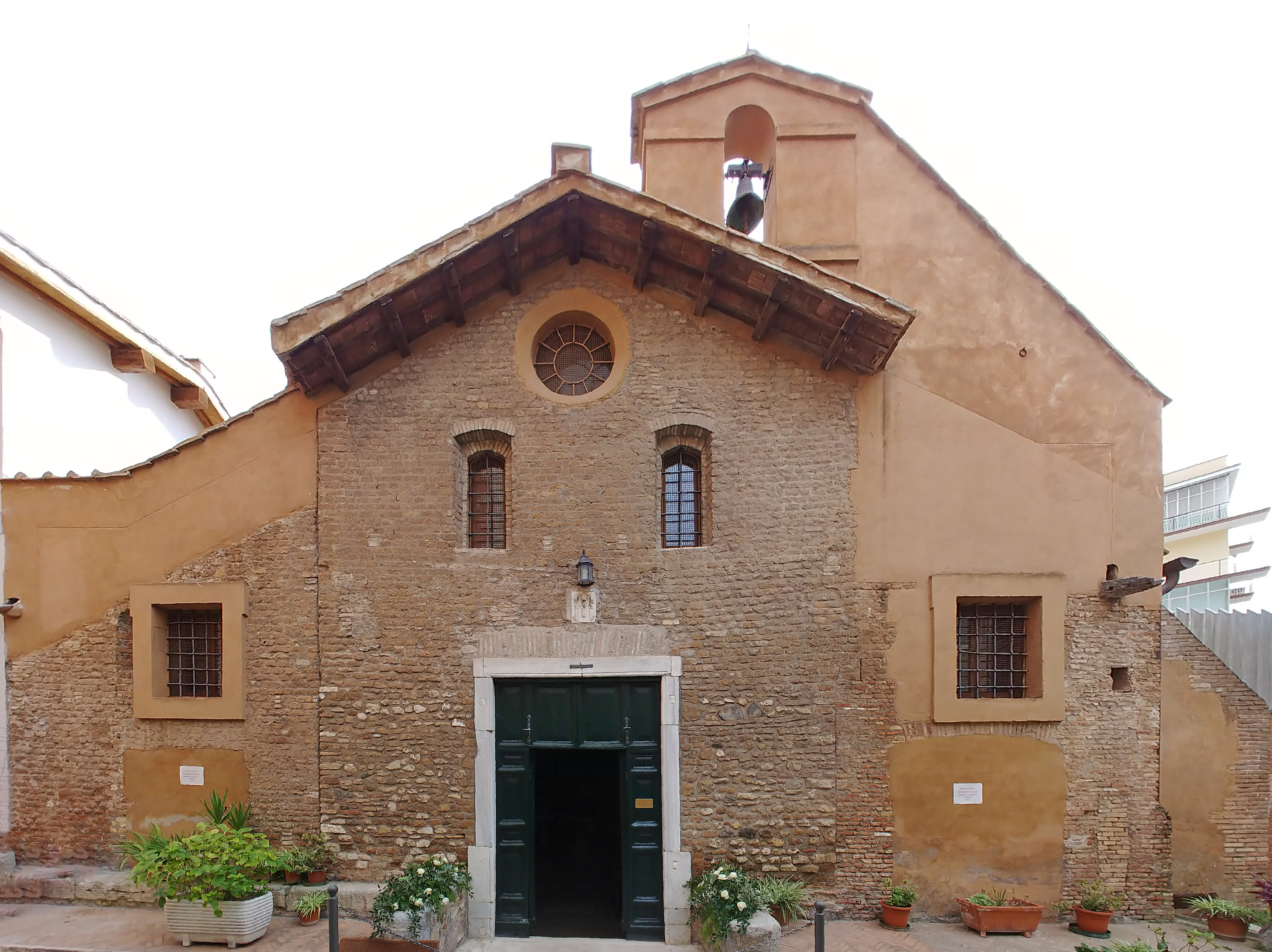 Facciata.